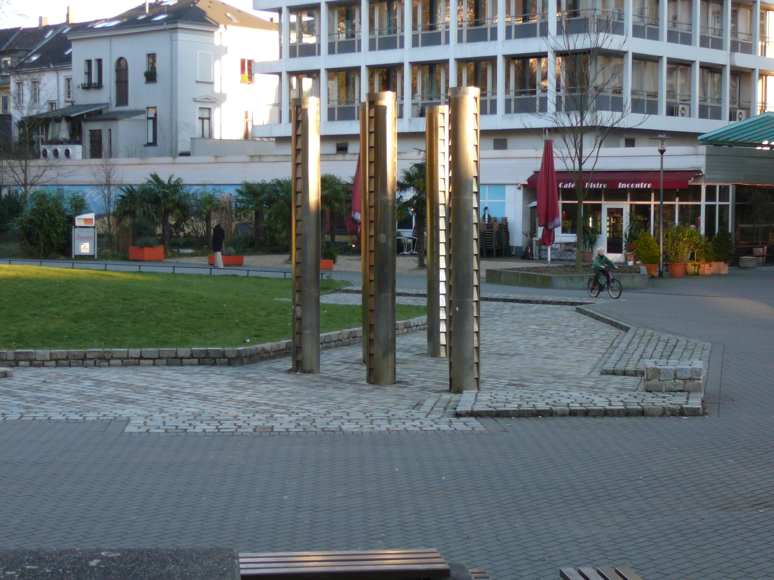 Briller Str, Wuppertal